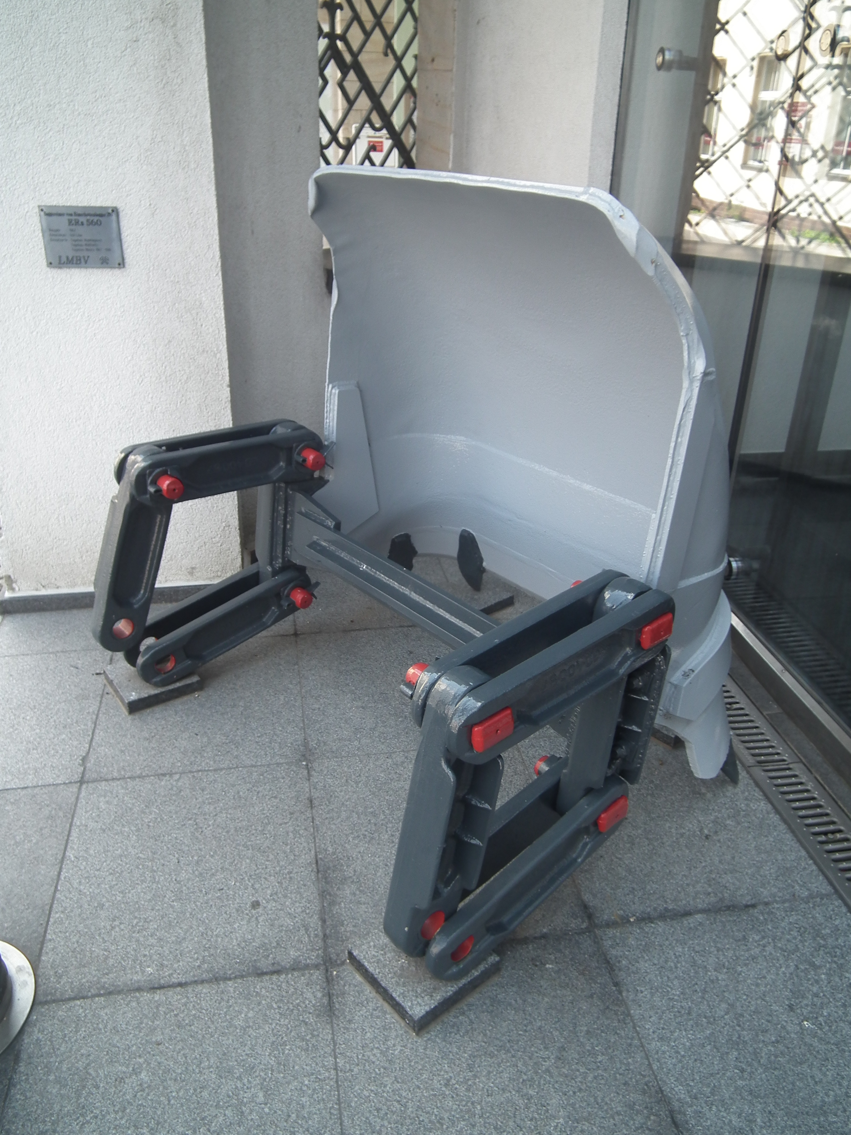 Baggereimer des Eimerkettenbaggers 297 vor dem Rathaus Senftenberg